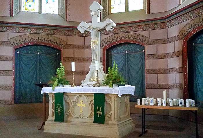 Altar der Evangelischen Kirche Isselhorst